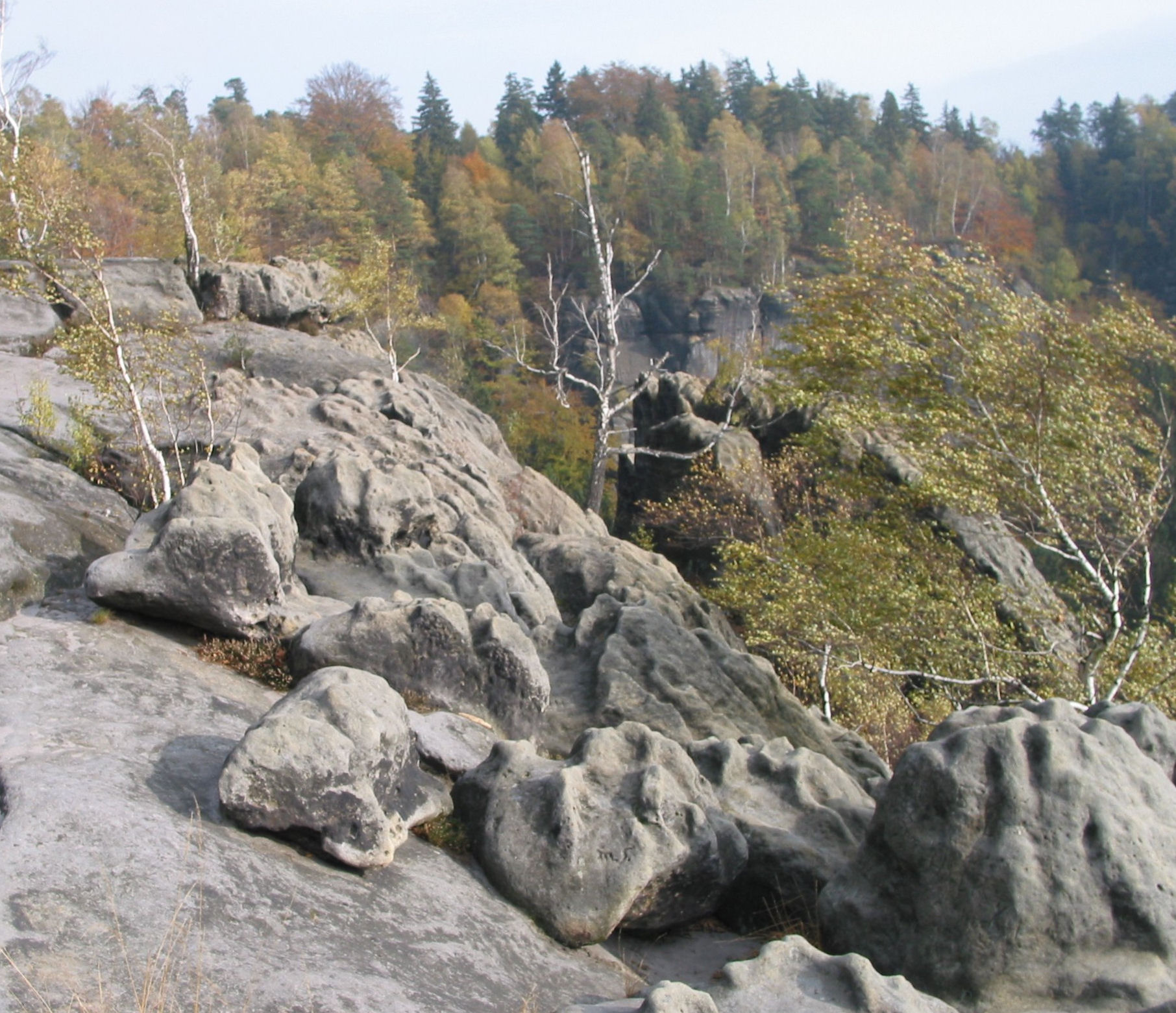 Karrenbildungen im Kreidesandstein des Elbsandsteingebirges